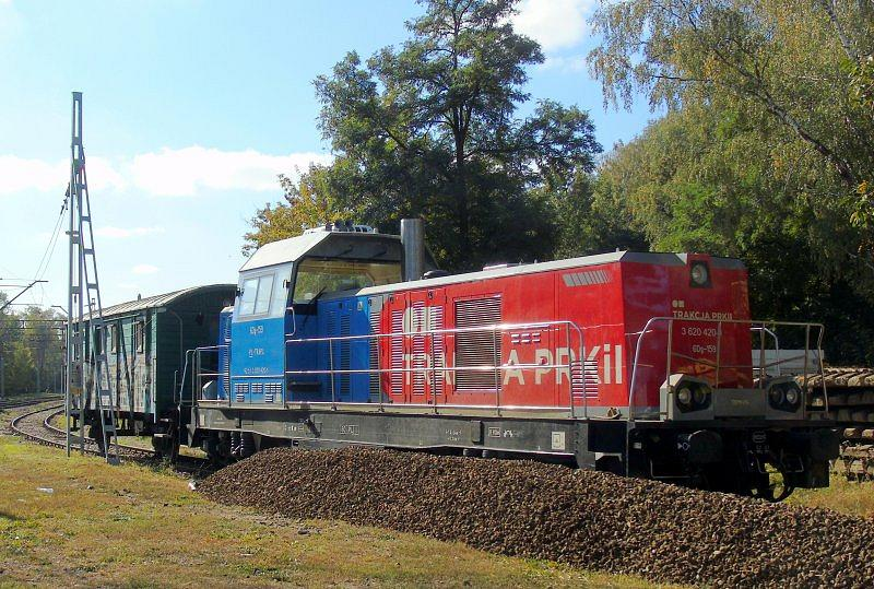 Spalinowóz 6Dg-159 należący do Przedsiębiorstwa Robót Kolejowych i Inżynieryjnych z Wrocławia stoi na terenie stacji Komorów.